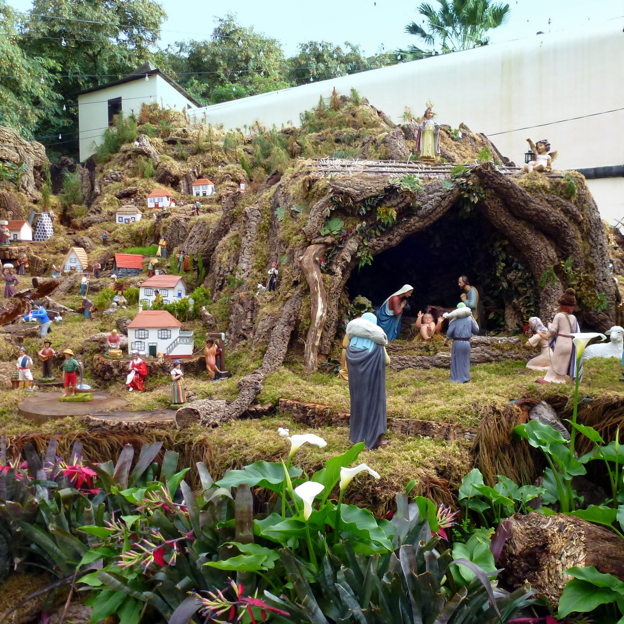 Funchal, Madeira - Presépio na Praça da Restauração